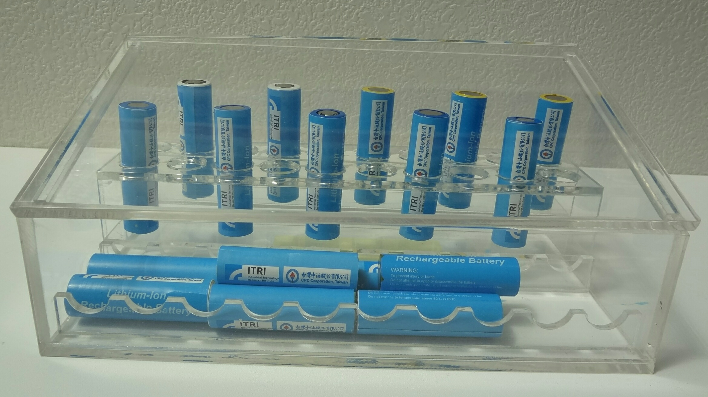 2013台北國際發明暨技術交易展，工研院創新前瞻館展示品：工研院與台灣中油合作研發的鋰離子電池。